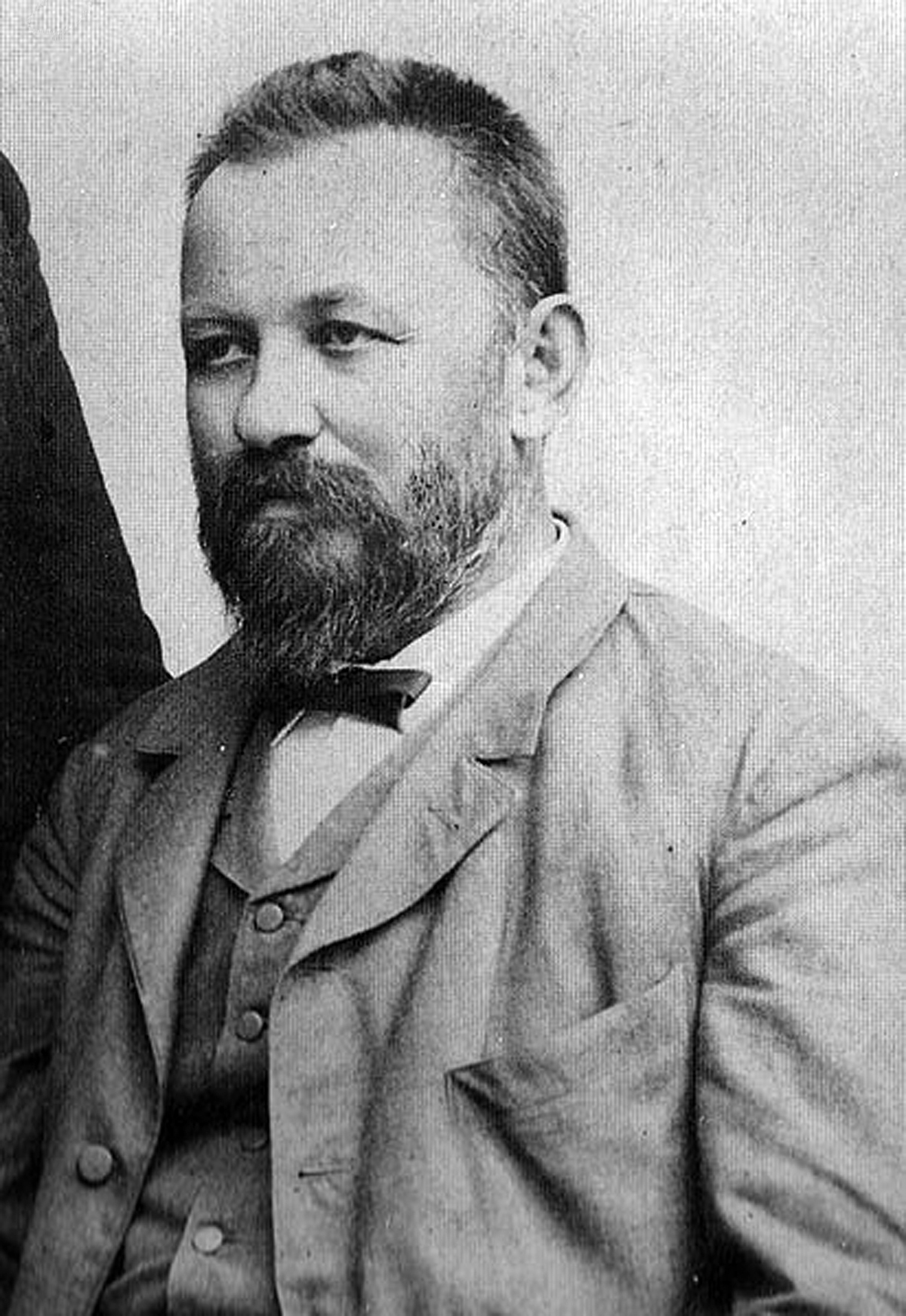 Светомир Николајевић, историчар књижевности (1844-1922)